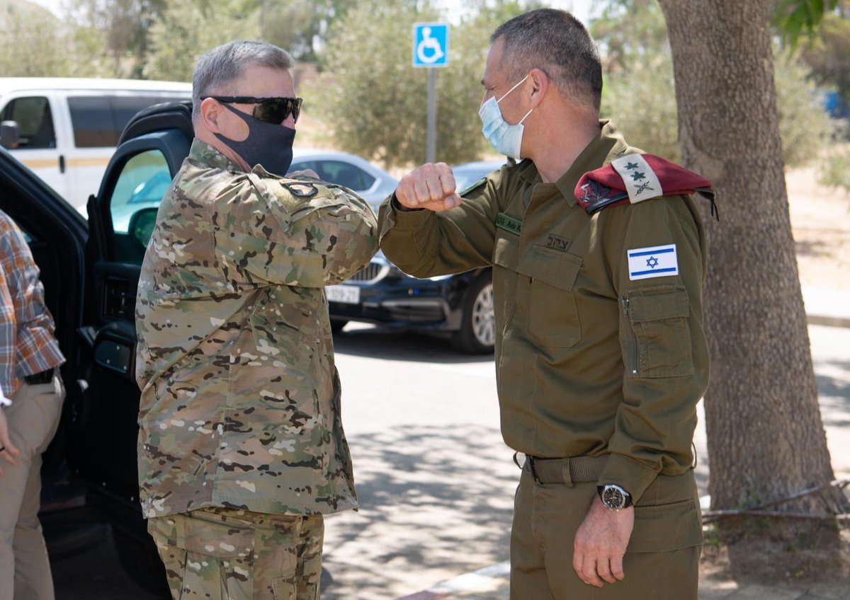 ביקורו של יושב ראש המטות המשולבים של צבא ארה״ב (המטו"ם), הגנרל (* * * *) מארק א. מילי, בבסיס נבטים של חיל האוויר. מדובר בביקורו השני של הגנרל בישראל מאז כניסתו לתפקיד.